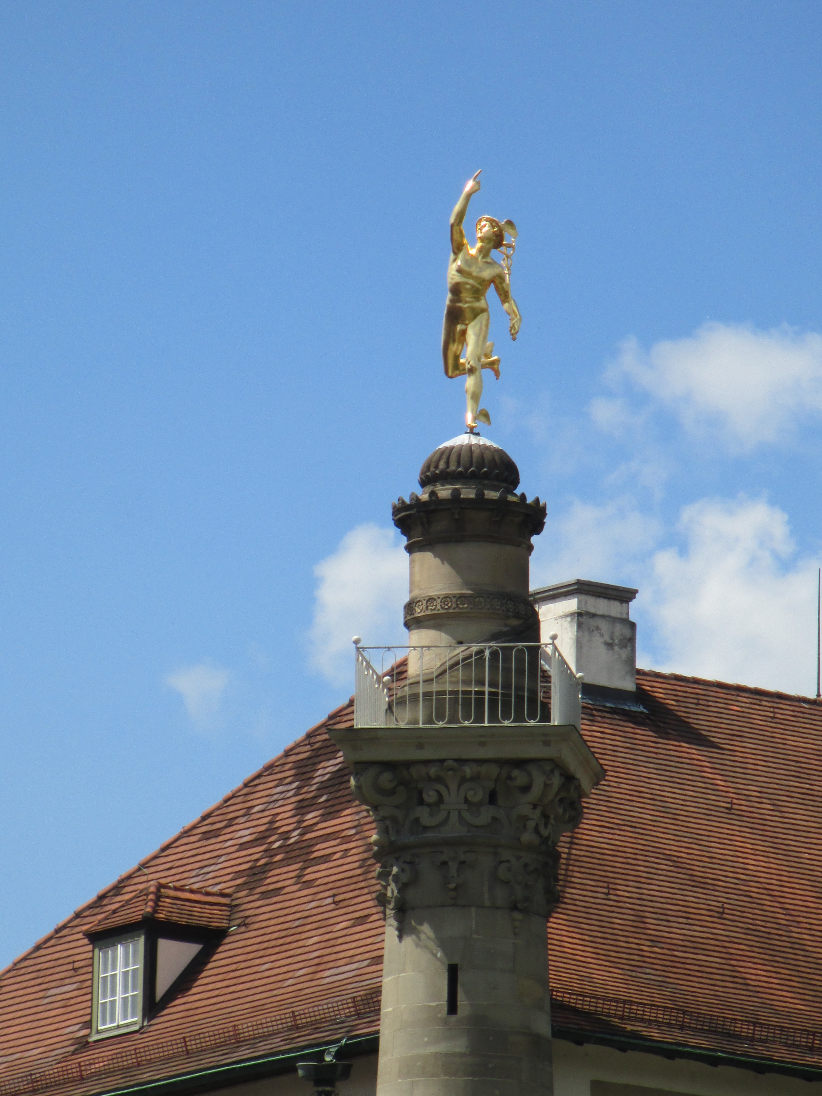 פסל מרקורי בשטוטגרט